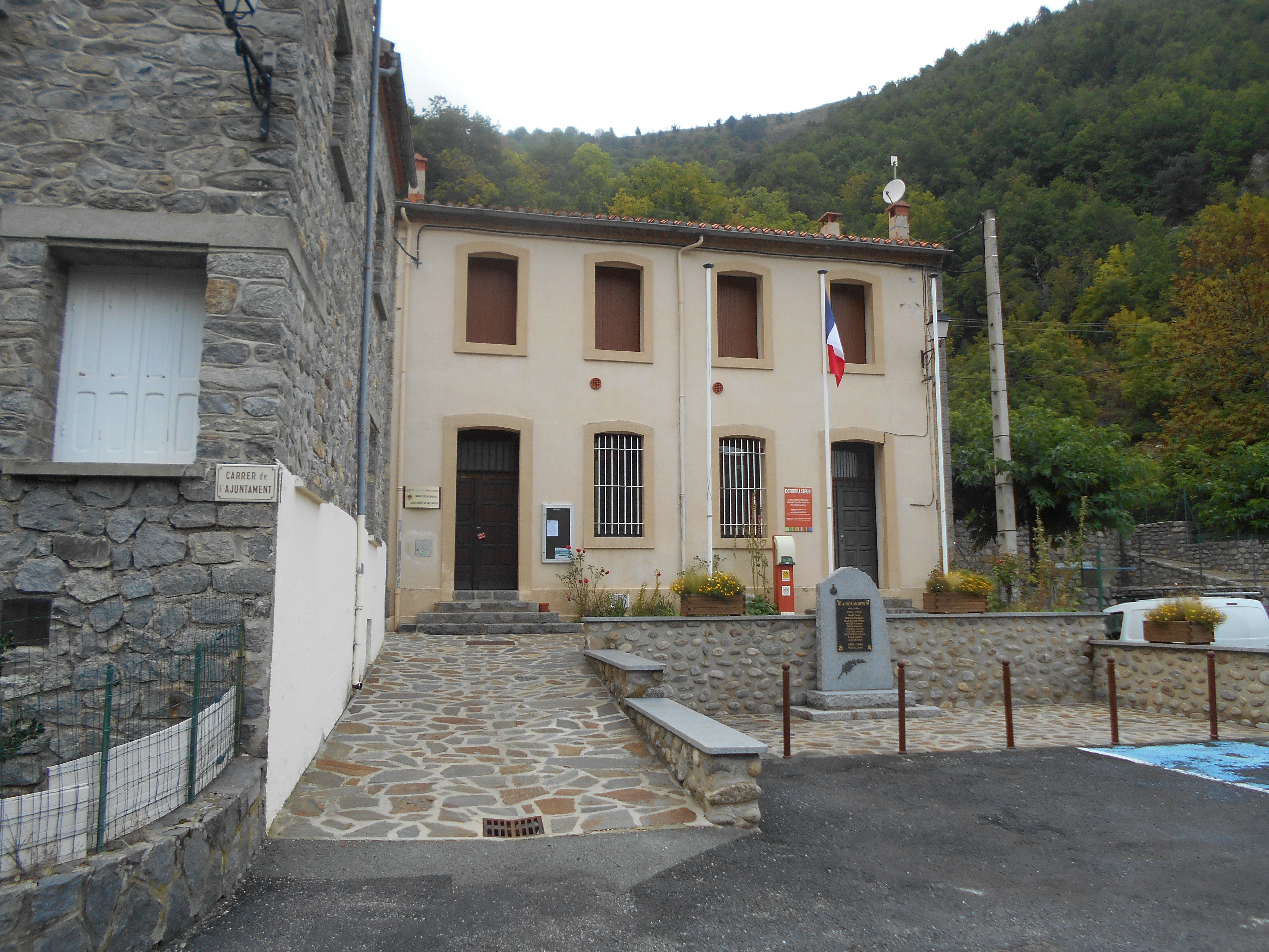 Casa de la Vila de Vallmanya